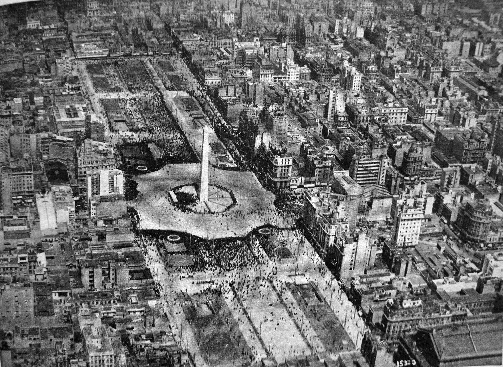 Fotografía aérea de los festejos de inauguración de la recién abierta Avenida 9 de Julio de la Ciudad de Buenos Aires (Argentina), el 12 de octubre de 1937. En el centro, el Obelisco construido en 1936 y atravesado por la Avenida Corrientes. En el extremo inferior derecho se distingue la estructura del Teatro Colón inaugurado en 1908.